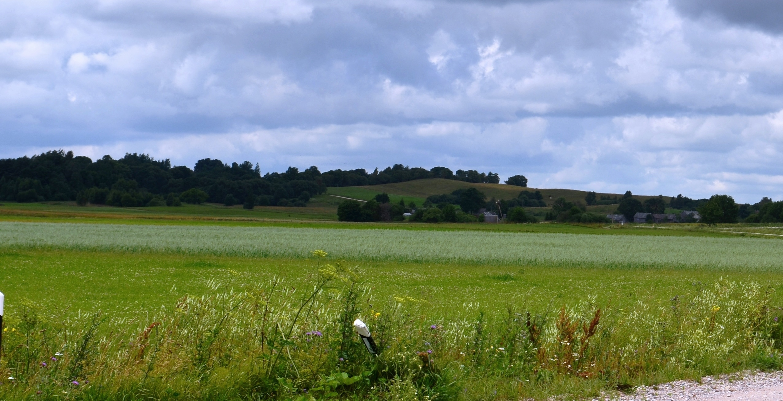 Juodainių alkakalnis, Šilalės r. Žemaitėška: Joudainiu alkas kalns (Skroskalnis), Šėlalės raj.